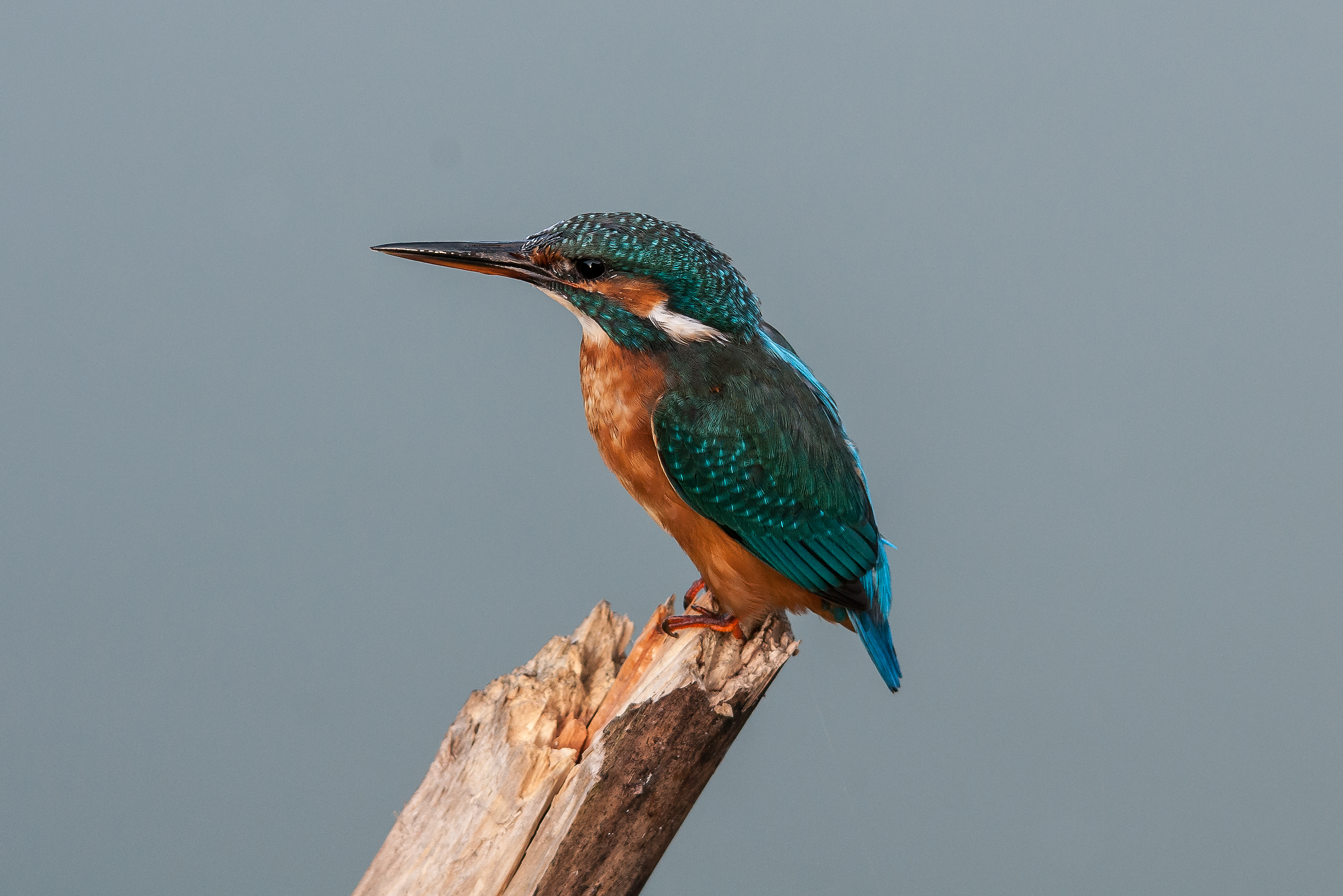 Oasi La Rizza